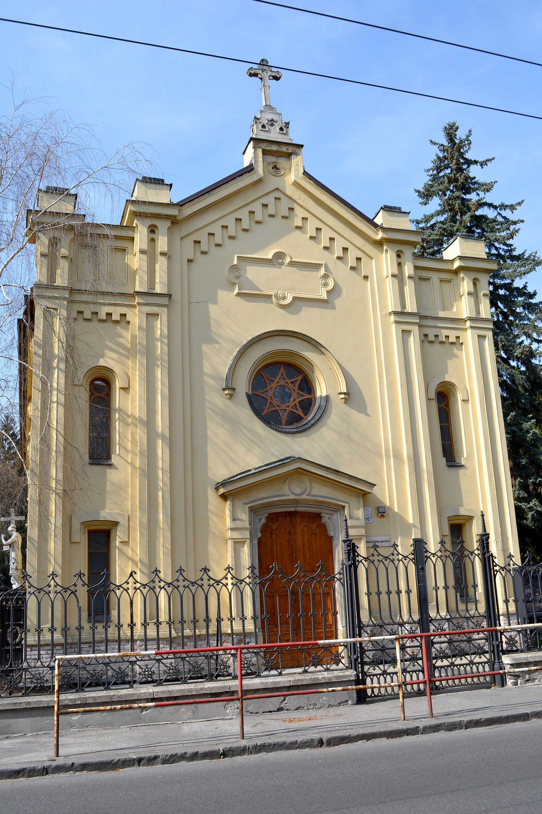 Pôvodne rozlúčková kaplnka, dnes kostol Bratskej jednoty batistov. Hlavné priečelie obrátené do ulice Palisády